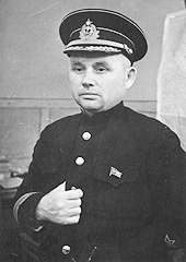 Филипп Сергеевич Октябрьский (1899 — 1969) — советский военачальник